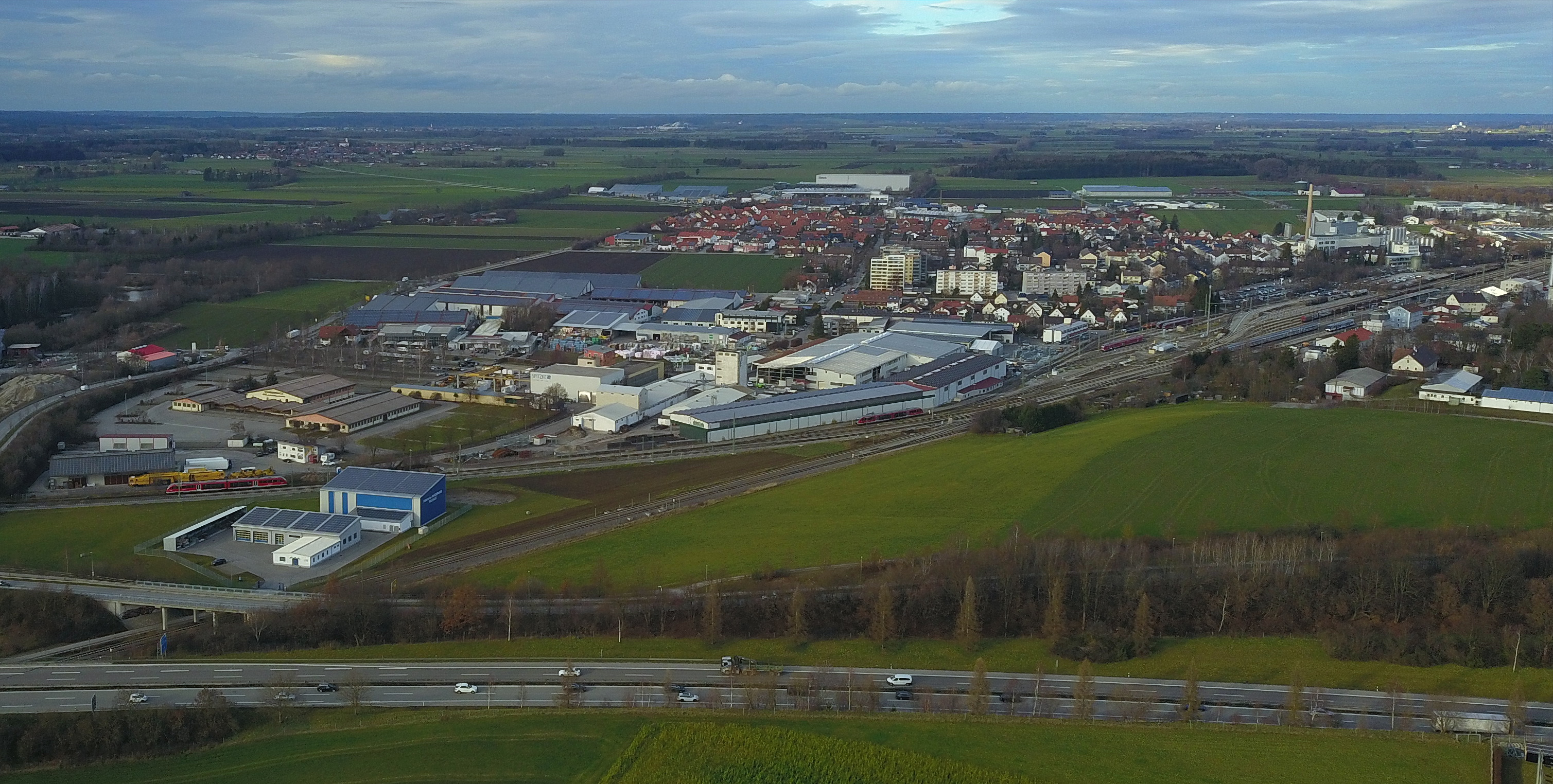 Bahnhof Buchloe sowie die Abzweigung der Bahnstrecke Buchloe-Memmingen mit 2 Zügen auf den Gleisen in Richtung Memmingen.